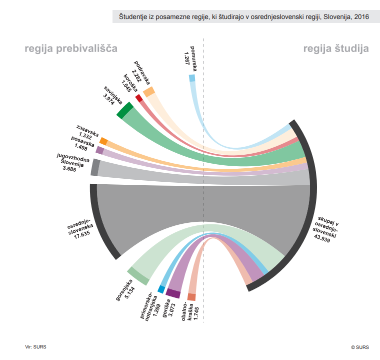 Študentje iz posamezne regije, ki študirajo v osrednjeslovenski regiji, Slovenija, 2016